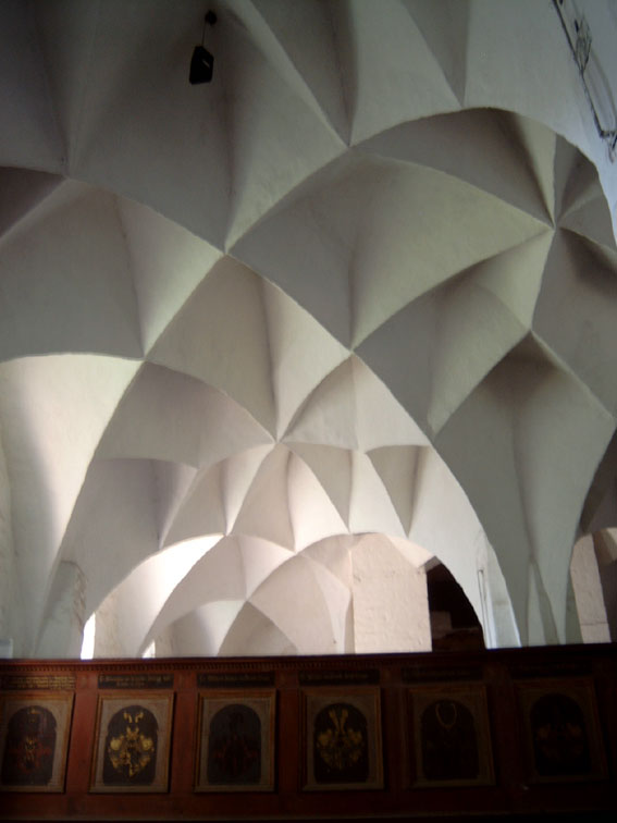 Das Zellengewölbe der St. Petrikapelle mit dem Zellengewölbe und der Empore